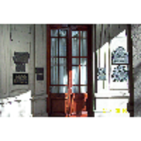 Sala Mario R. Vecchioli. Sociedad Italianaa